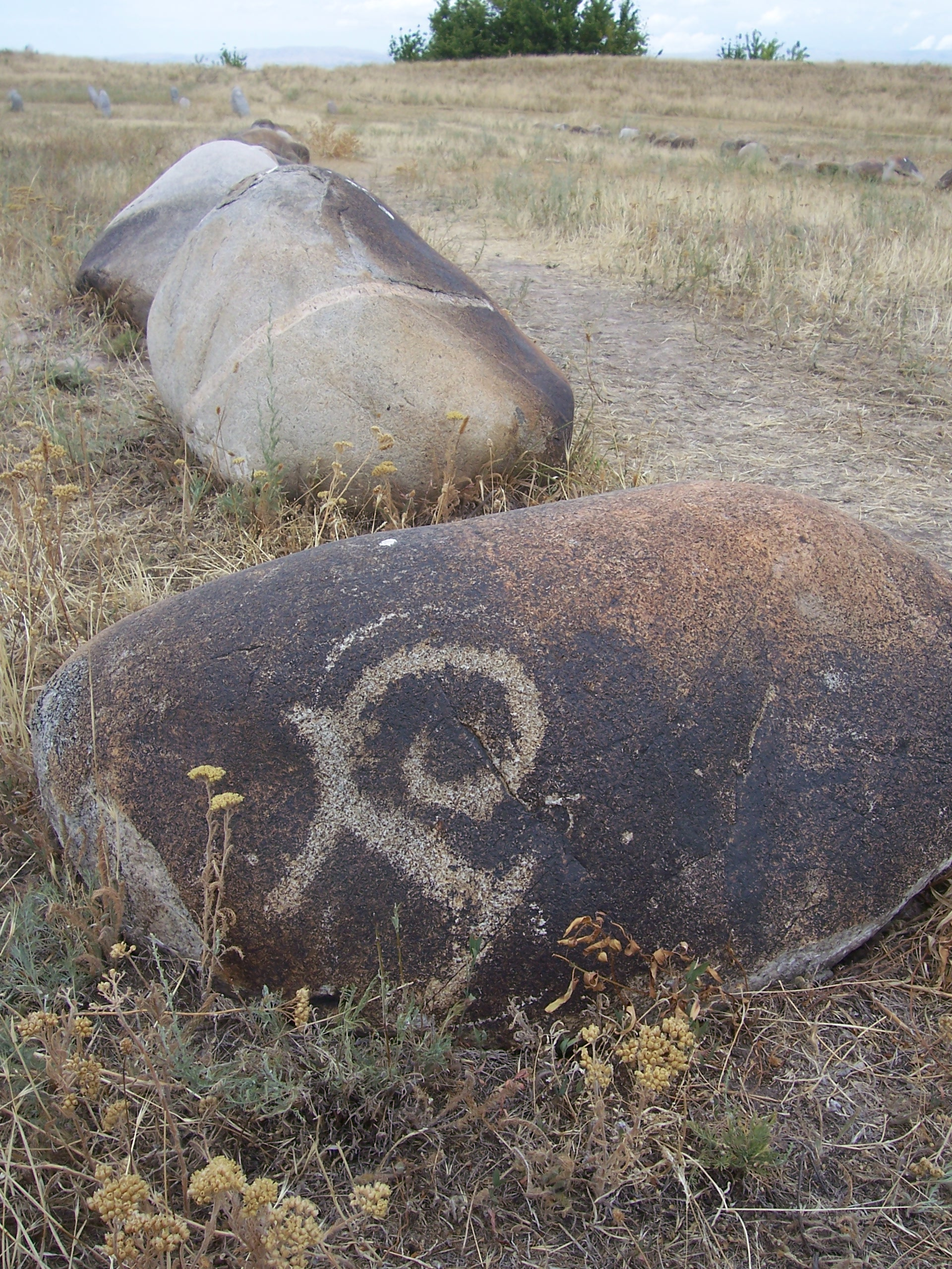 Pétroglyphe scythe dans l'actuel Kirghizistan (tour de Burana)